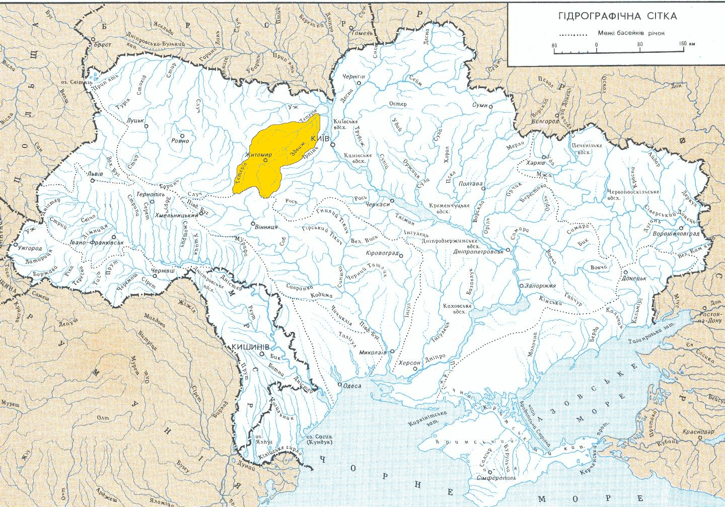 Бассейн реки Тетерев.